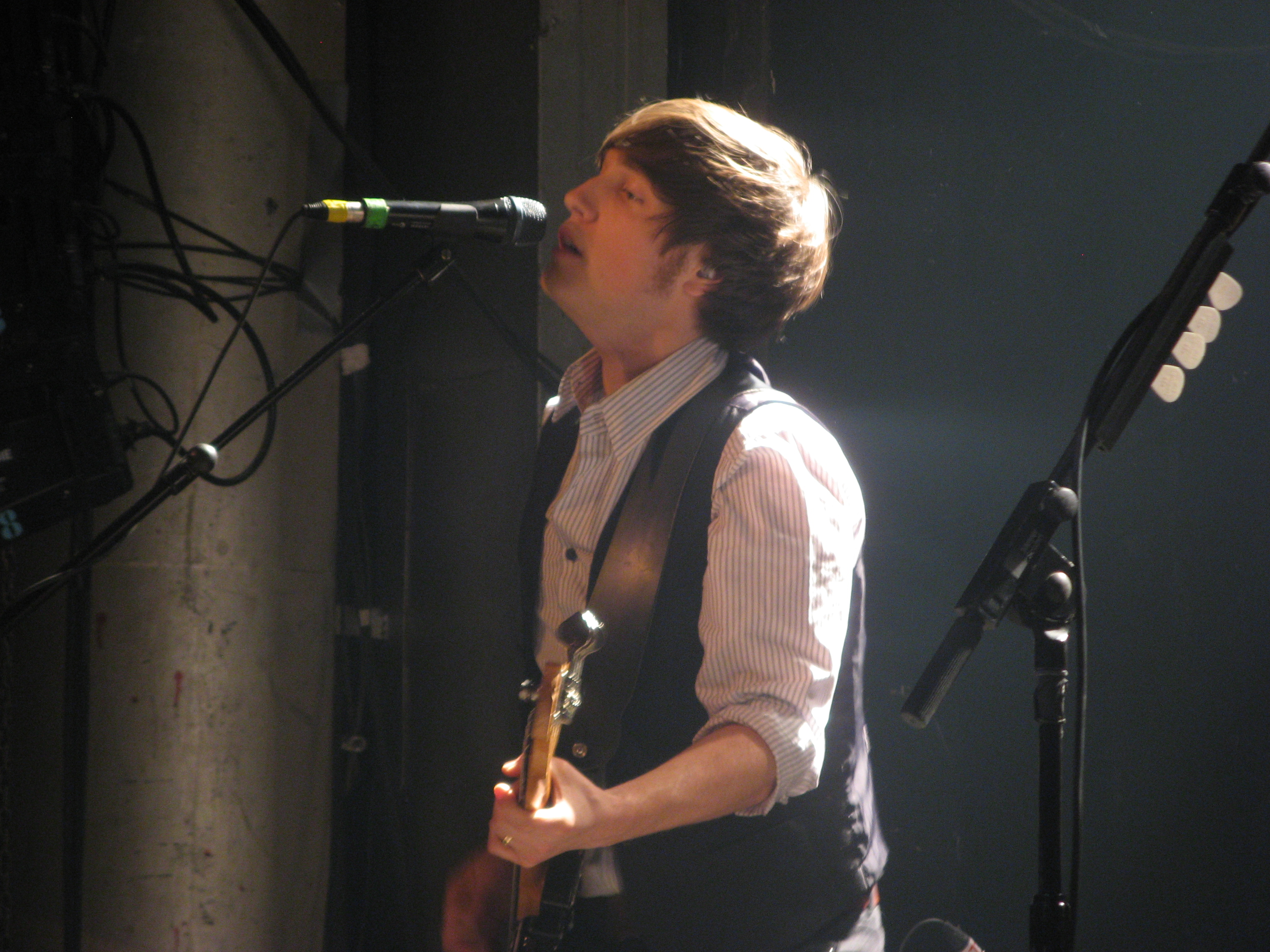 Carl-Johan Fogelklou.